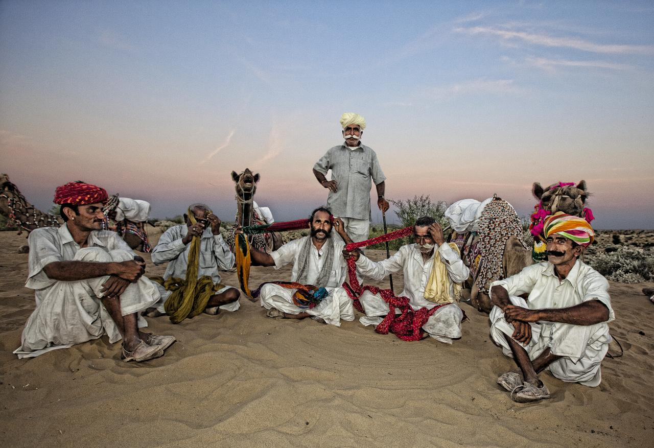 rajasthan